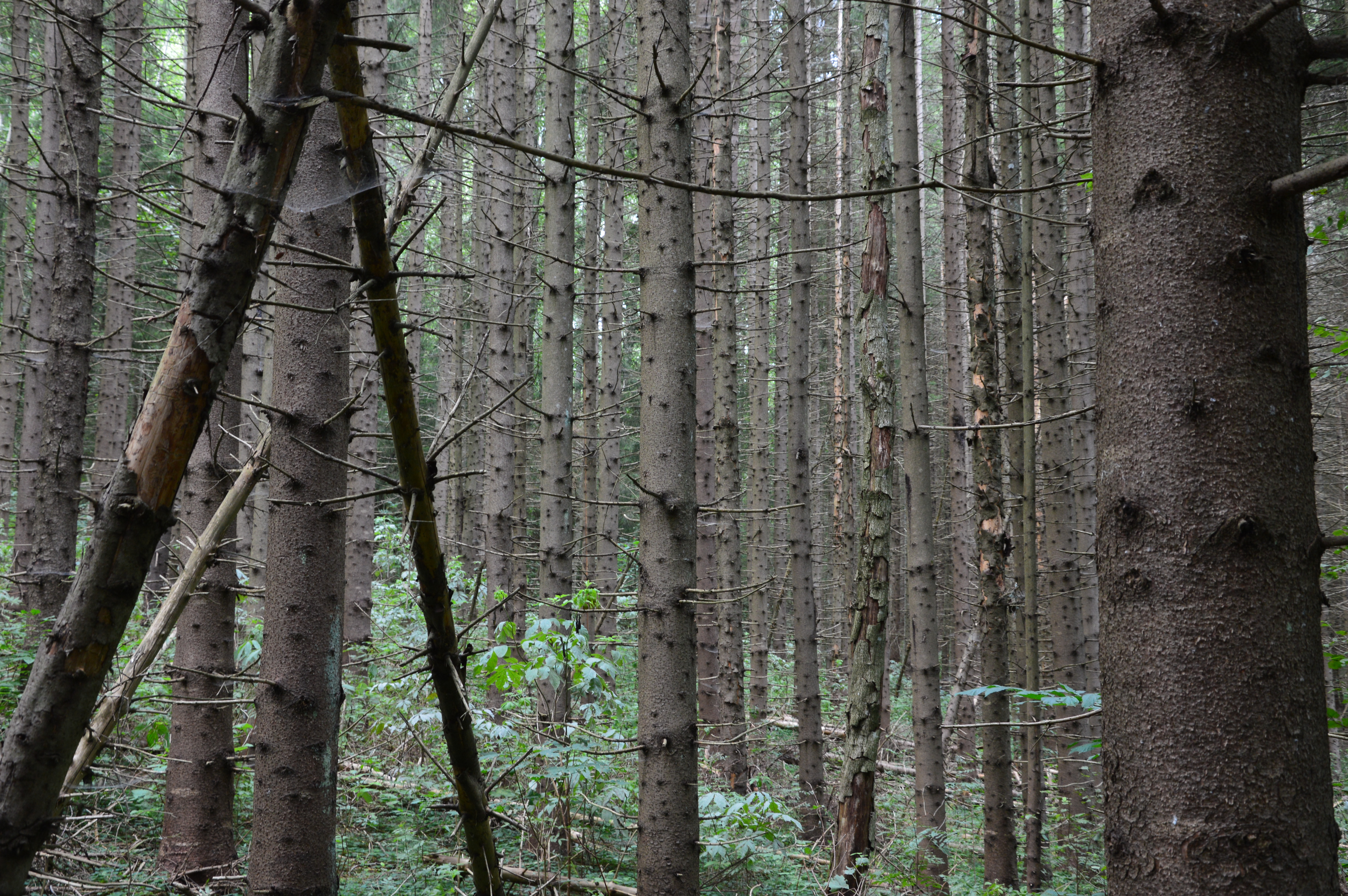 Noor kuusik Suure Munamäe läheduses.